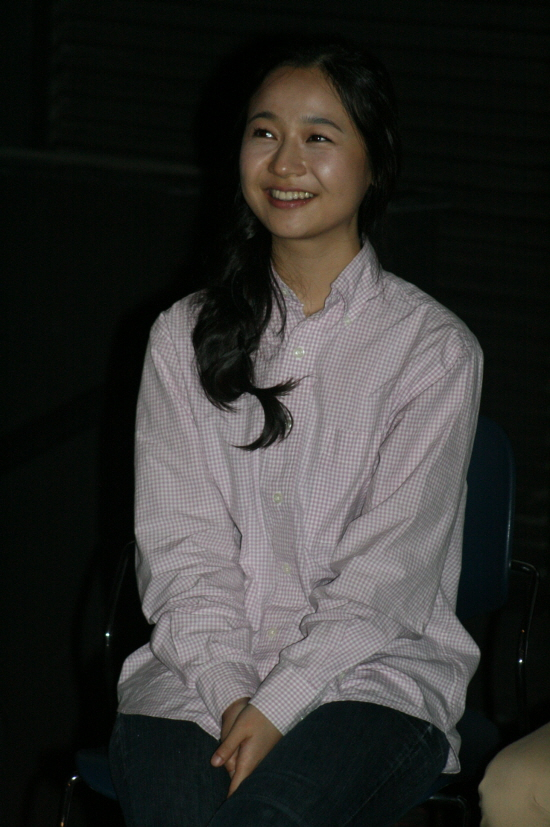 김꽃비 - 귀 시사회